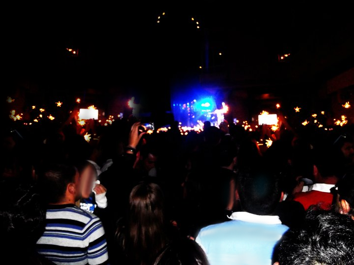 Celebración el ultimo dia de la Gudalupe con vengalas.